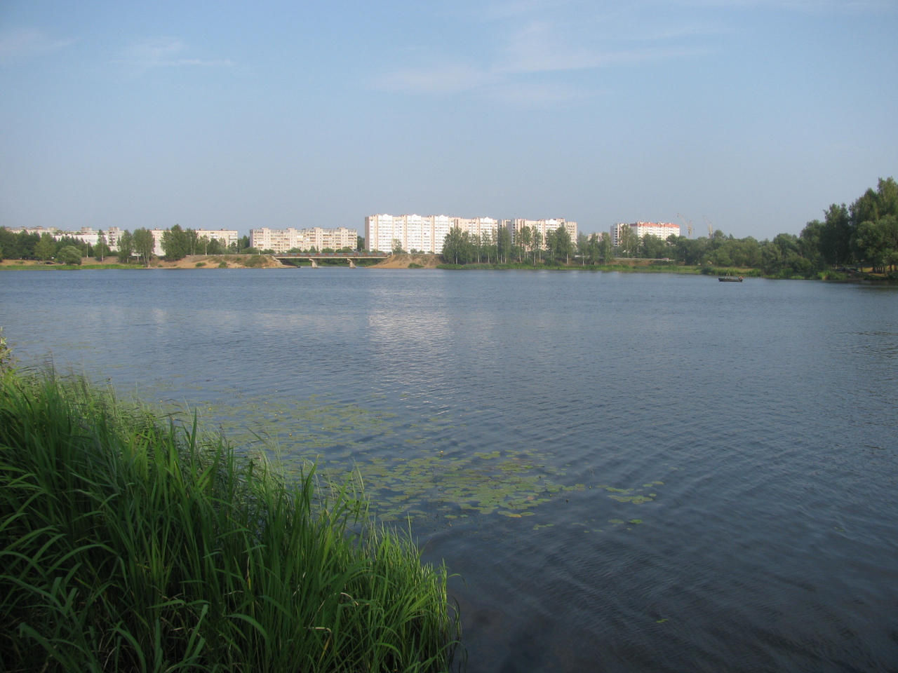 Река Донховка в своем нижнем течении, перед местом впадания в Волгу.